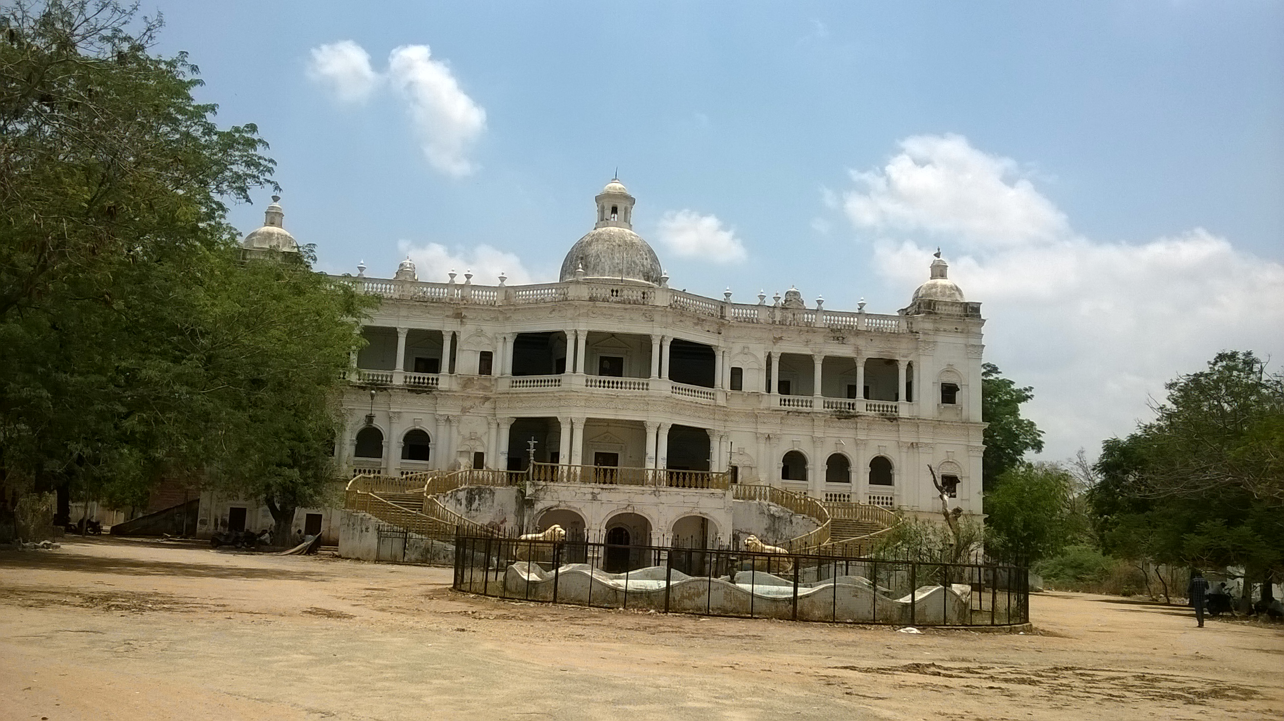 వనపర్తి రాజ భవనం